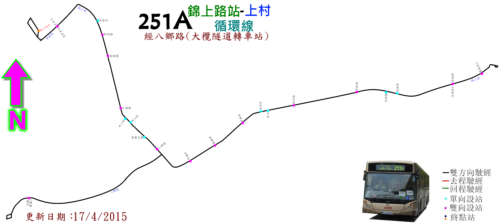 中文（香港）: 九巴251A線的走線圖